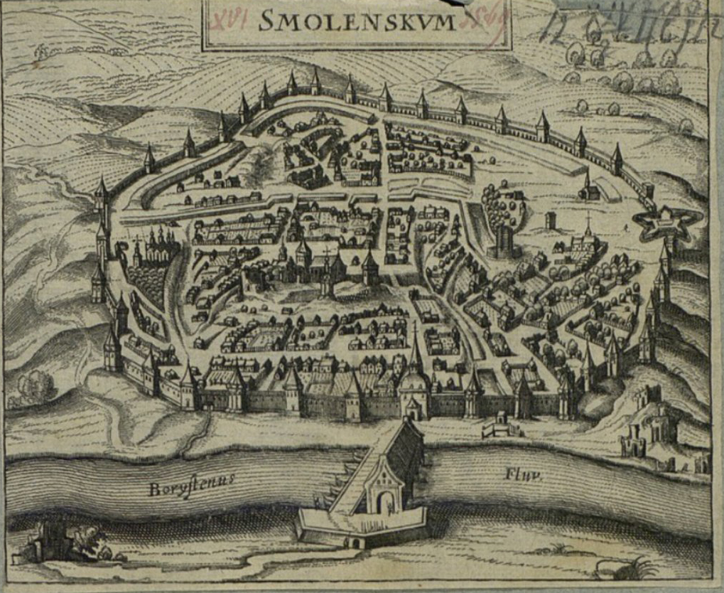 Беларуская (тарашкевіца): Смаленск (Smalensk). Плян места